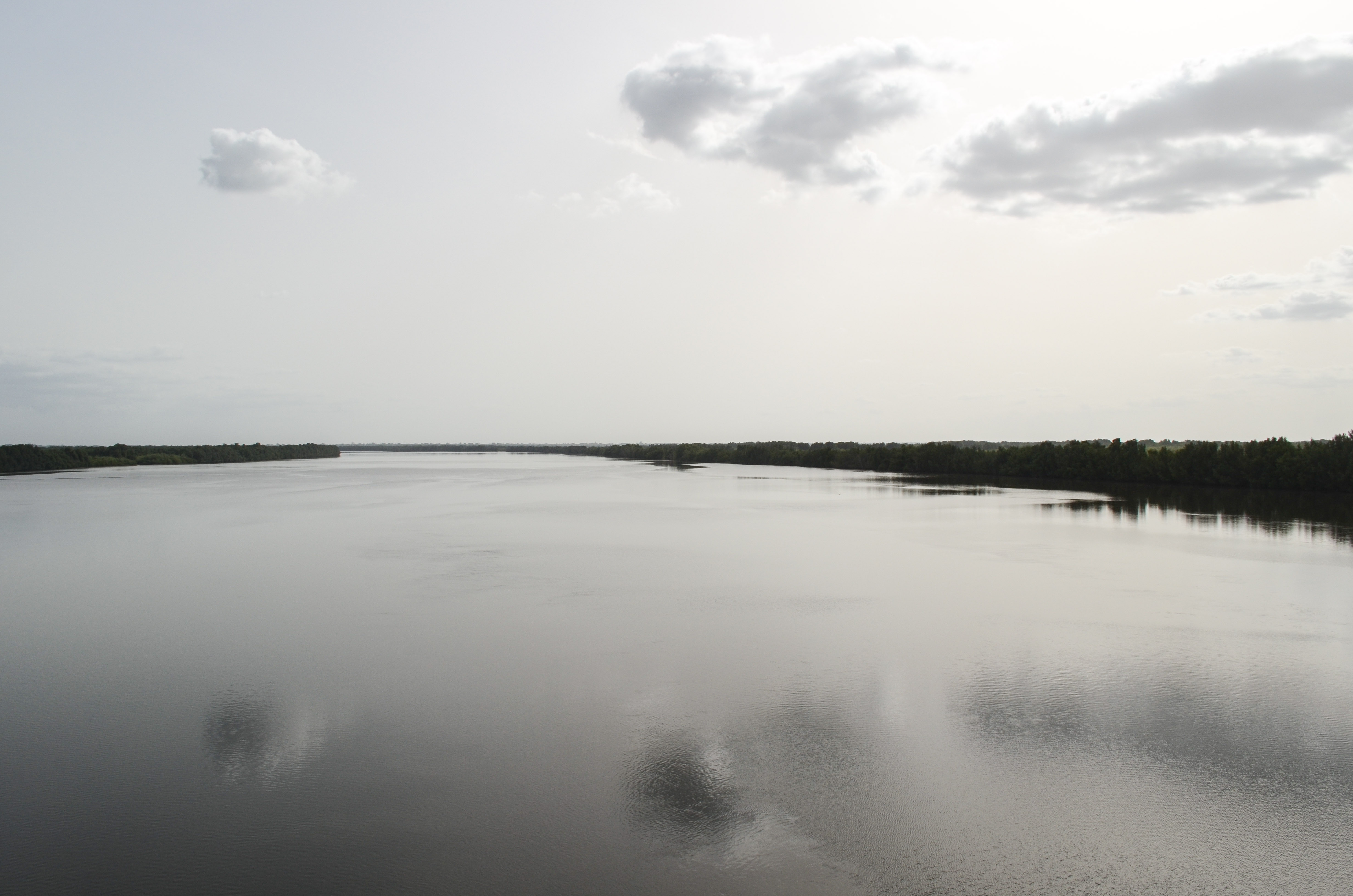 20130609-DSC_8961